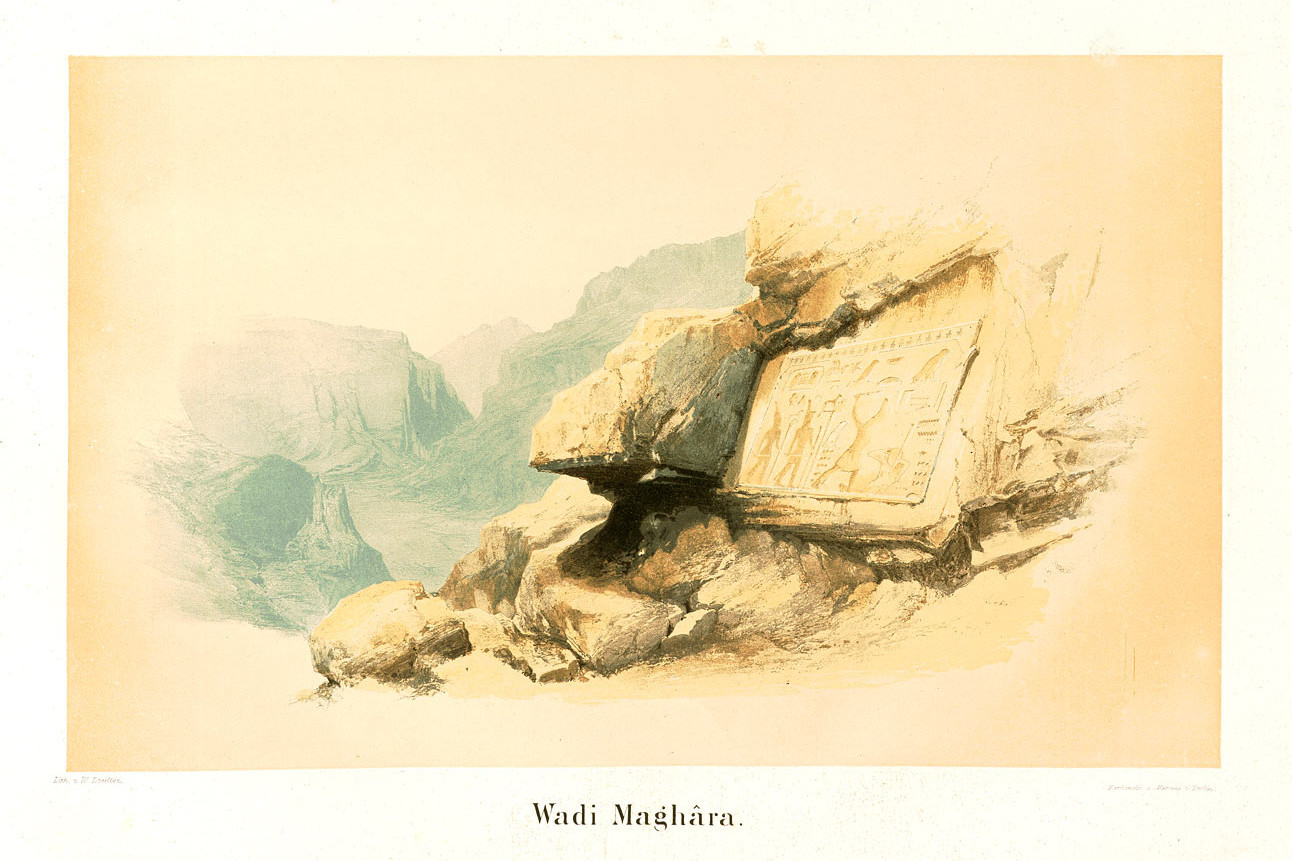 Relief of Seneferu in Wadi Maghara. Denkmaeler aus Aegypten und Aethiopien nach den Zeichnungen der von Seiner Majestät dem Koenige von Preussen, Friedrich Wilhelm IV., nach diesen Ländern gesendeten, und in den Jahren 1842–1845 ausgeführten wissenschaftlichen Expedition auf Befehl Seiner Majestät